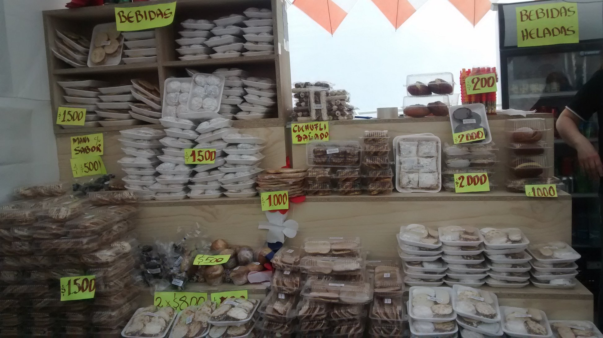 Lugar de Venta de Dulces horneados base de harina y relleno de dulce de leche o manjar